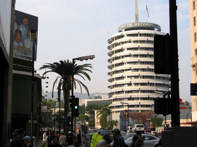 洛杉磯好萊塢的地標，首都唱片大樓 位於洛杉磯市區好萊塢大道(Hollywood Blvd.)與范恩街(Vine St.)交叉路口旁的首都唱片大樓(Capital Record Building)是好萊塢重要的地標建築，也是許多知名藝人發跡的原點。大樓背後的山頭上，依稀......可以見到好萊塢另一個重要的象徵物，山坡上的「H-O-L-L-Y-W-O-O-D」字樣看板。 本圖片由上傳者User:SElephant拍攝於2003年2月。